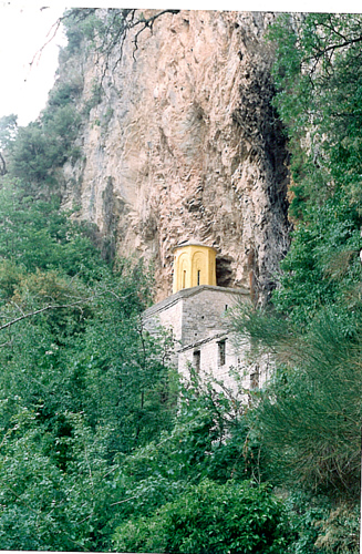 Σε βράχο του Φαραγγιού του Ασπρορέματος στα Αγραφα